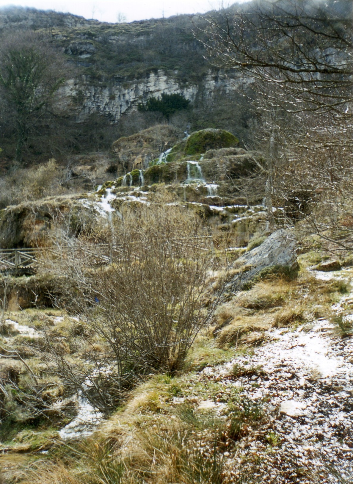 Cueva del Agua, el manantial principal que da salida a las aguas subterraneas del páramo calizo.